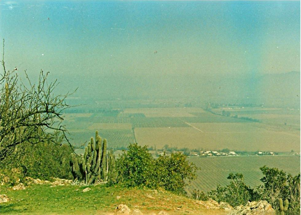 Cerro Grande de la Compañia, sitio arqueológico chileno